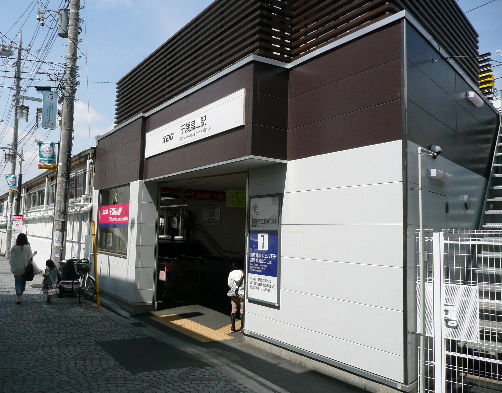 千歳烏山駅南口